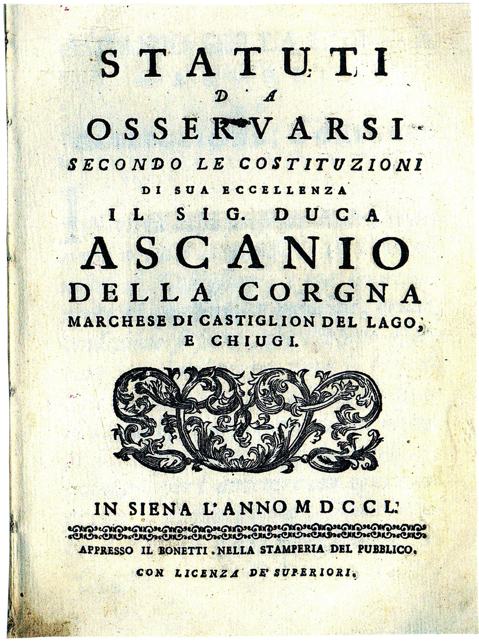 Gli Statuti di Ascanio della Corgna (conservati a Castiglione del Lago e Perugia)